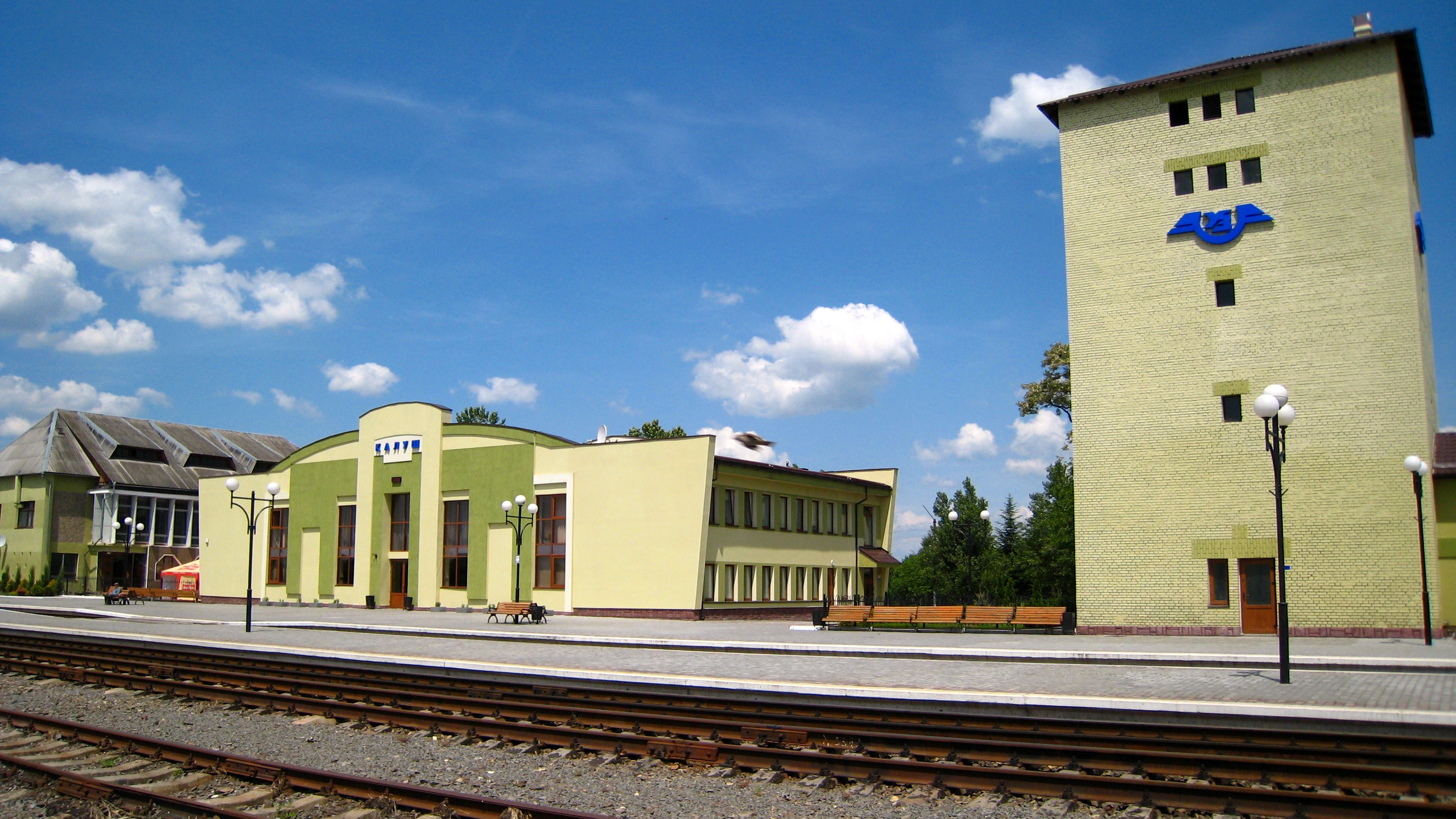 Залізнична станція Калуш